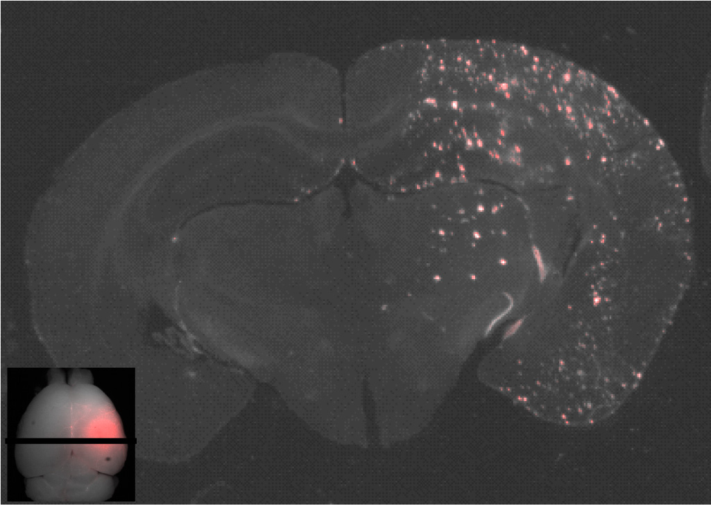 Schnitt durch das Gehirn einer Maus. Die Fluoreszenz zeigt die lokale Öffnung der Blut-Hirn-Schranke an.